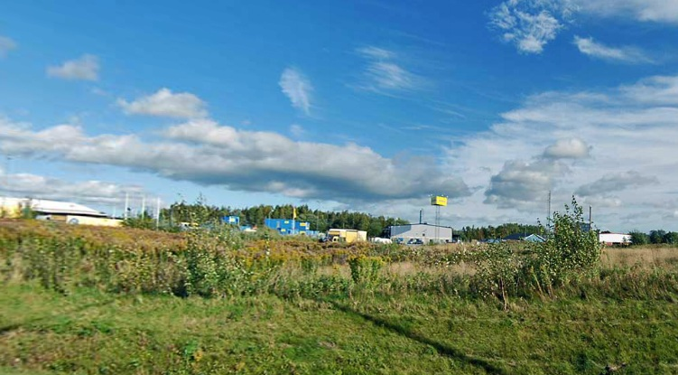 Bäckaskogen i Skövde settfrån östraleden